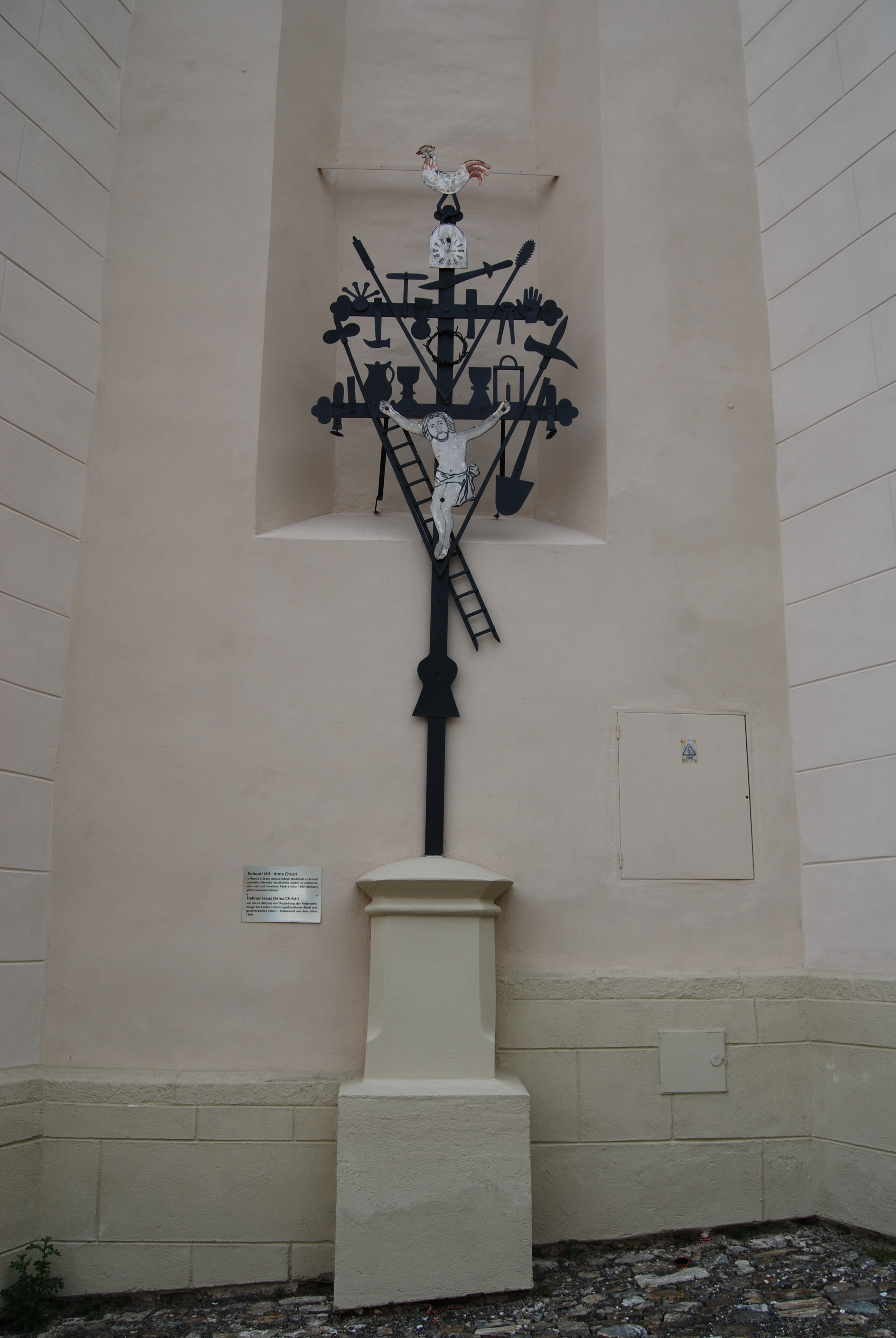 Kohoutí kříž na kostele svaté Markéty na náměstí. Kašperské Hory - něm. Bergreichenstein - v okrese Klatovy, kraj Plzeňský. Česká republika.